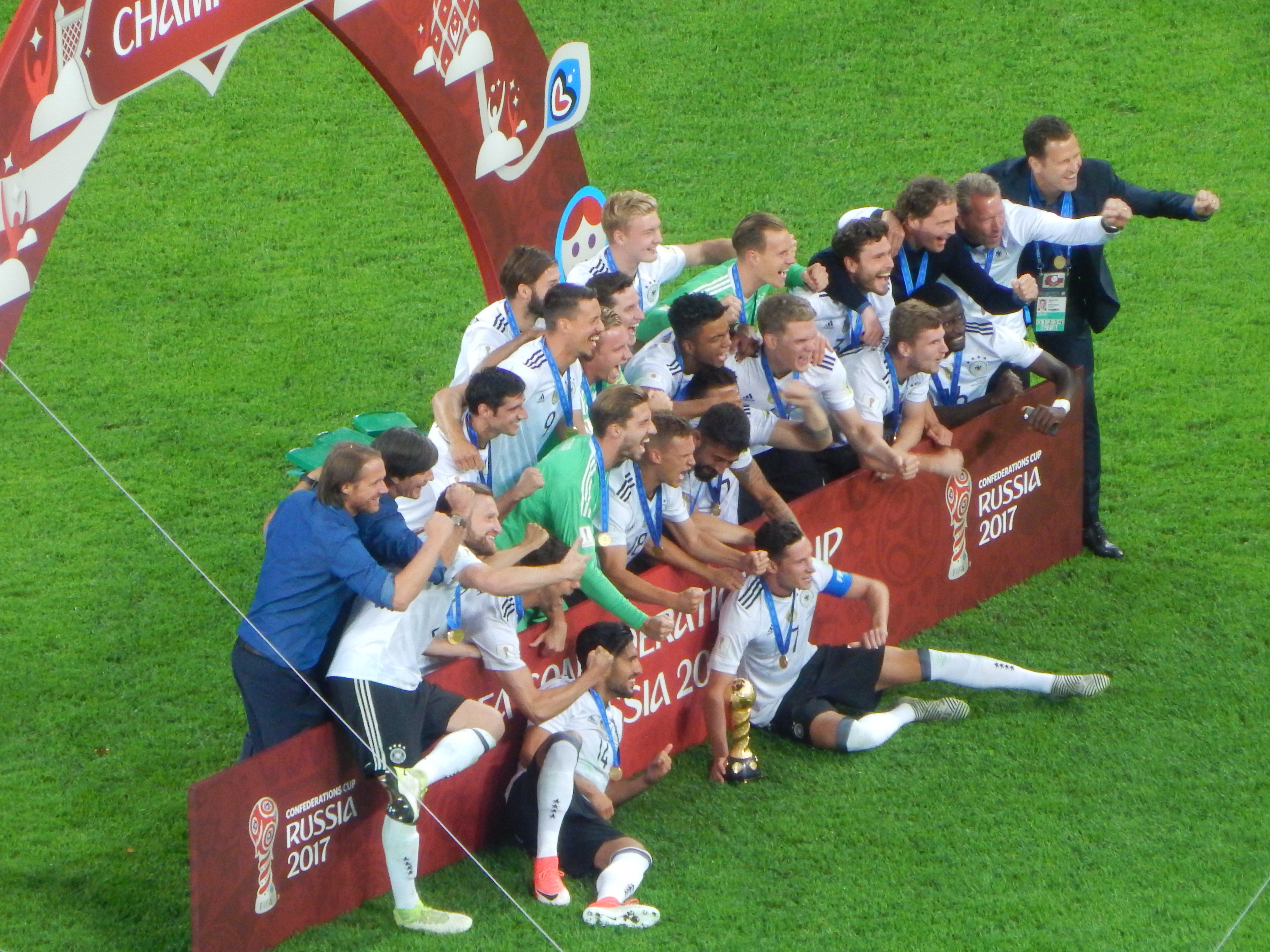 Финал Кубка конфедераций 2017